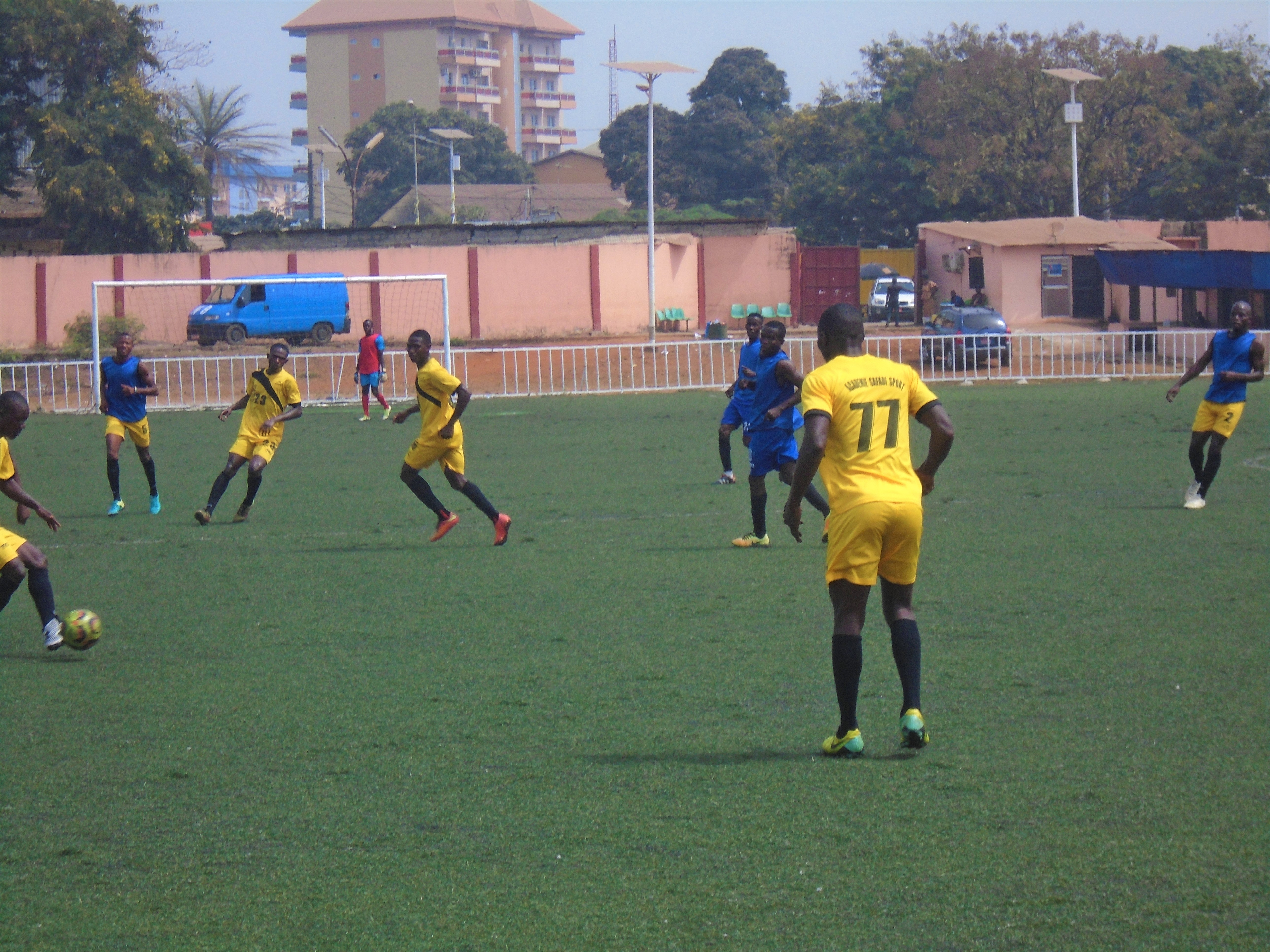 Jeux au stade Anexe du 28 septembre